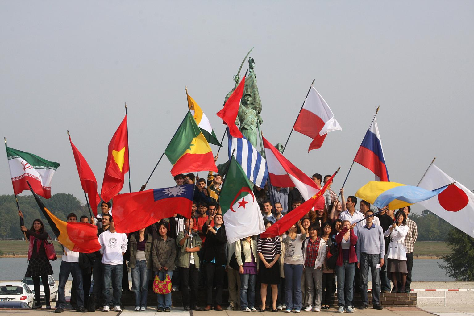 Campus de l'École polytechnique, élèves étrangers dans la Cour d'Honneur.